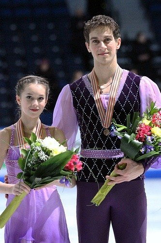 Василиса Даванкова и Андрей Депутат (Россия) на подиуме чемпионата мира по фигурному катанию среди юниоров 2012 (бронзовые медали)